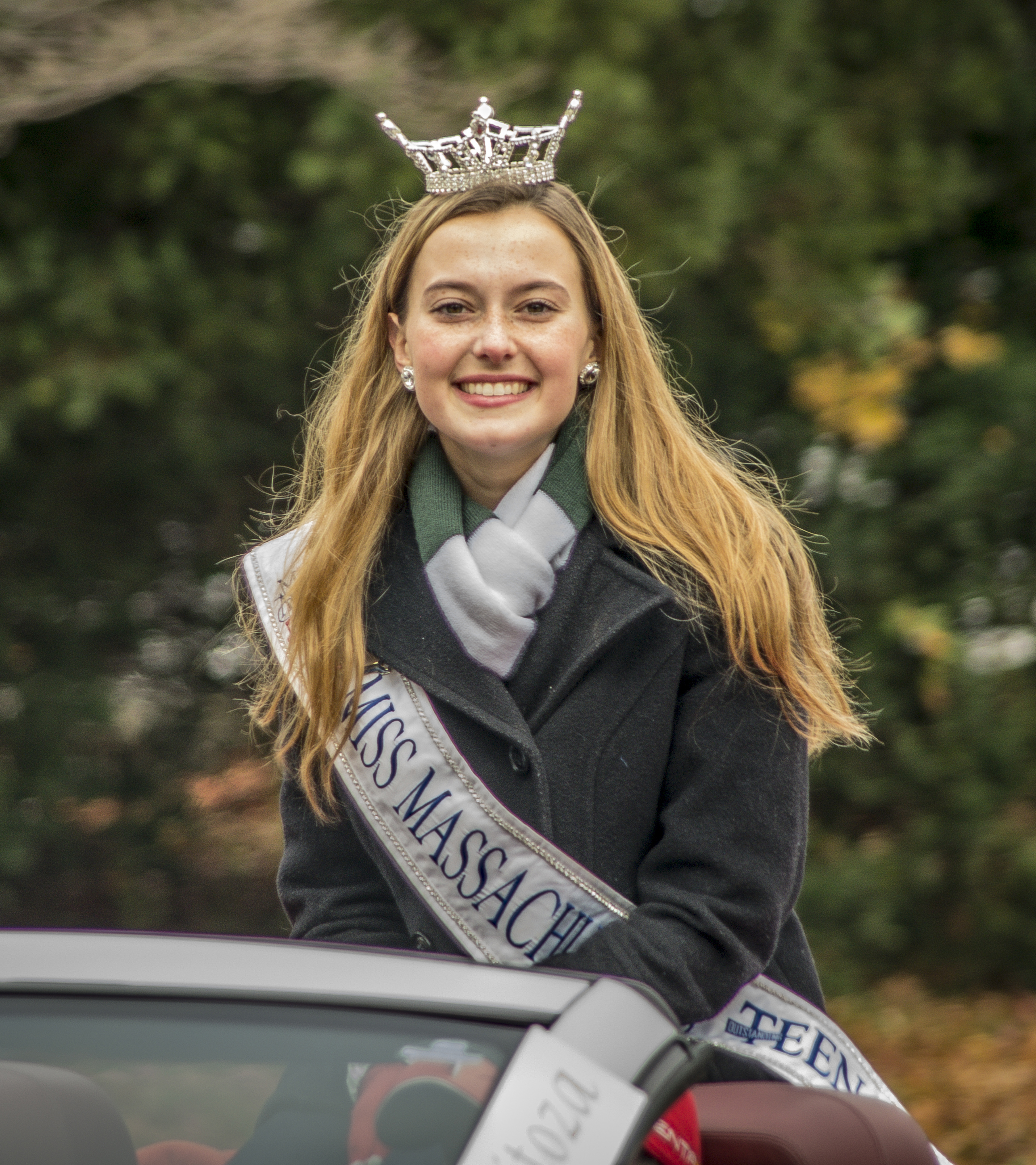 Alyssa Maitoza, Miss Massachusetts Outstanding Teen 2016